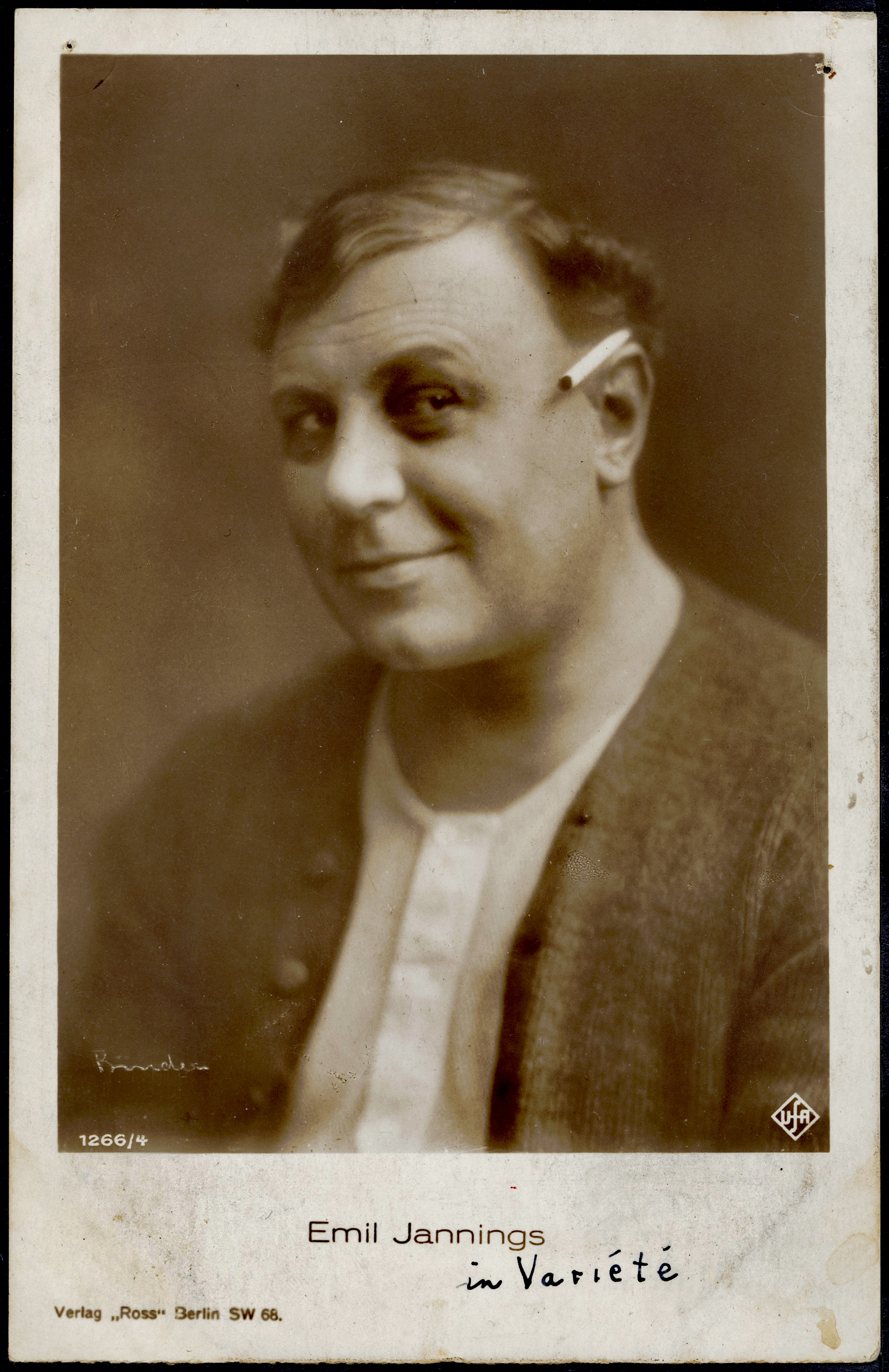 Emil Jannings in Variété. Ross Verlag 1266/4